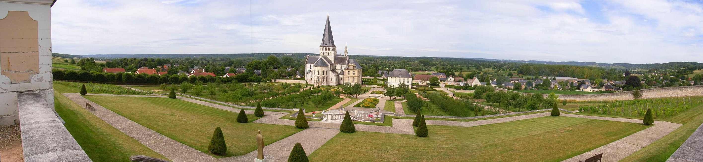 Panoramamontage Garten der Abtei St. George, St. Martin de Boscherville, Normandie, Frankreich